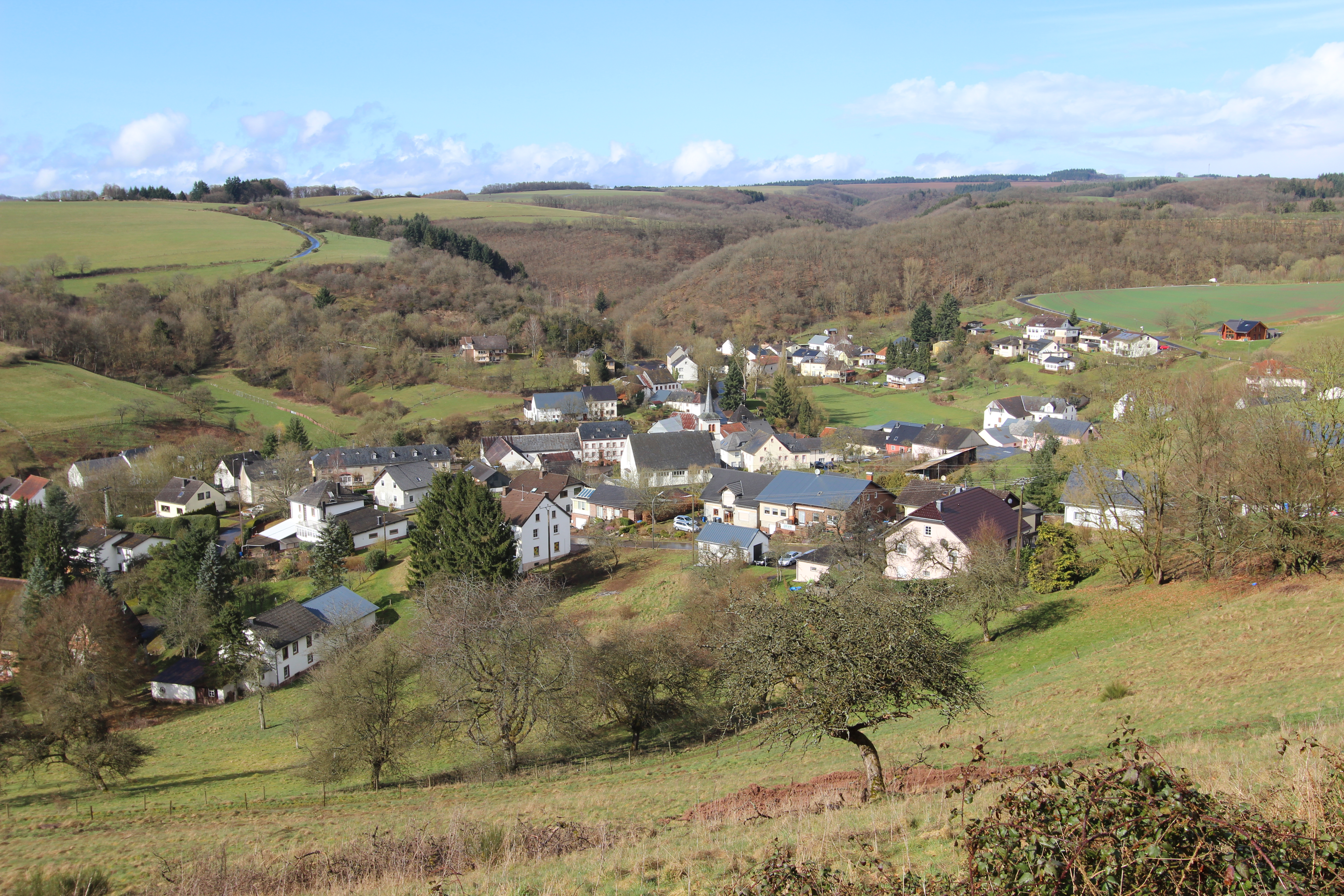 Ansicht von Utscheid (früher Outscheid, Oytscheit, Oizscheit, Oizscheid, Oitscheid oder Oitscheit). Aufnahmeort: Ortsteil Untere Buscht.